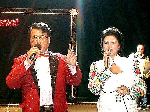 Irina Loghin si Ion Dolanescu